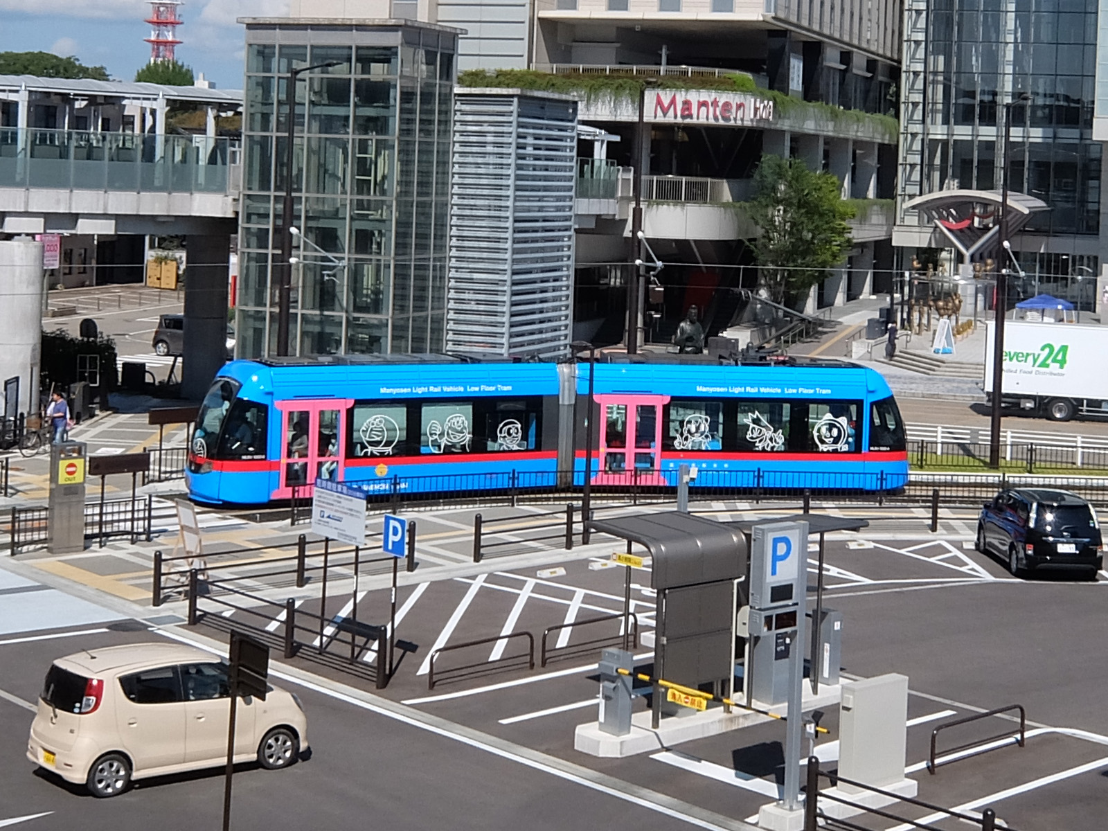 ドラえもんトラム